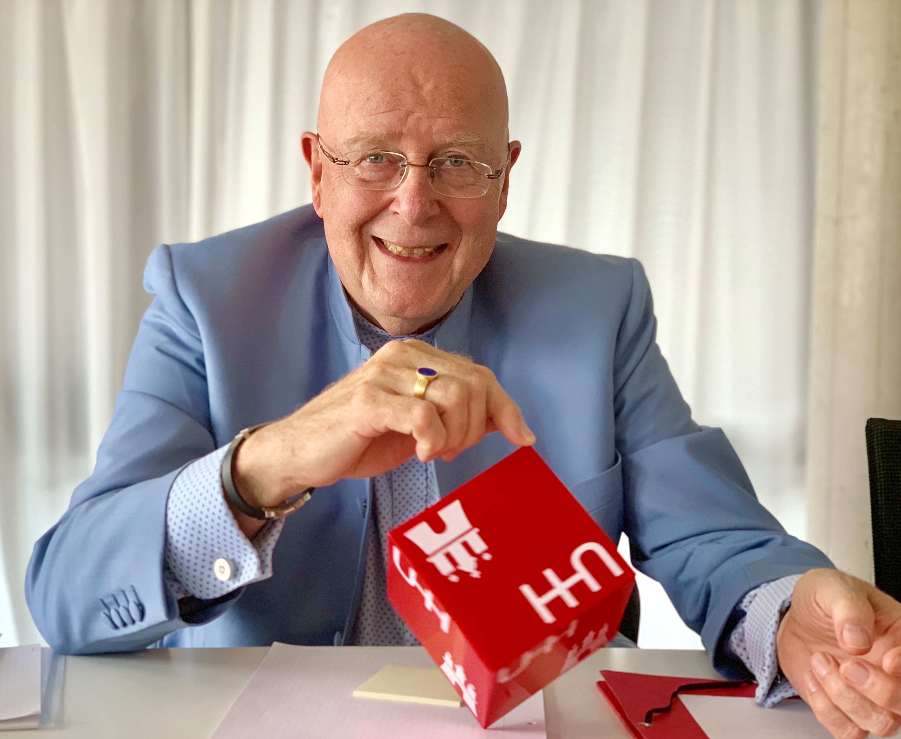 Prof. Dr. Dr. h.c. Dieter Lenzen